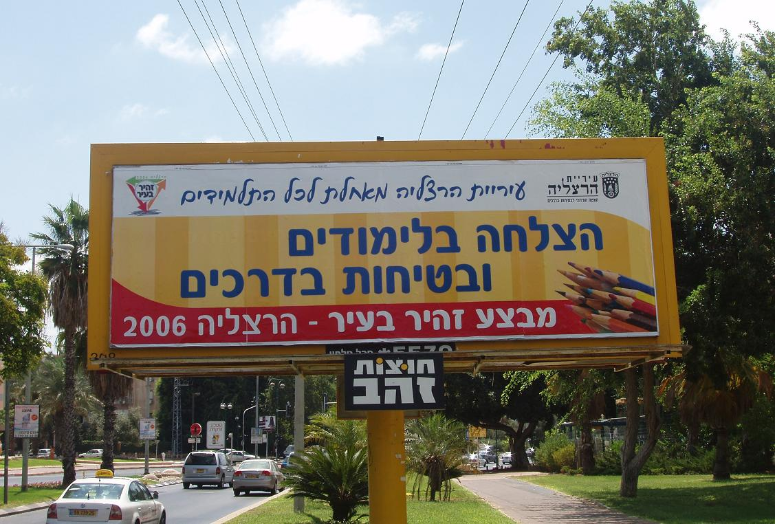 שלט חוצות לקראת פתיחת שנת הלימודים. צילם דוד שי.